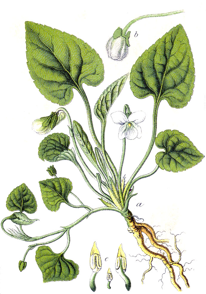 Viola alba Besser Original Caption Weisses Veilchen, Viola alba